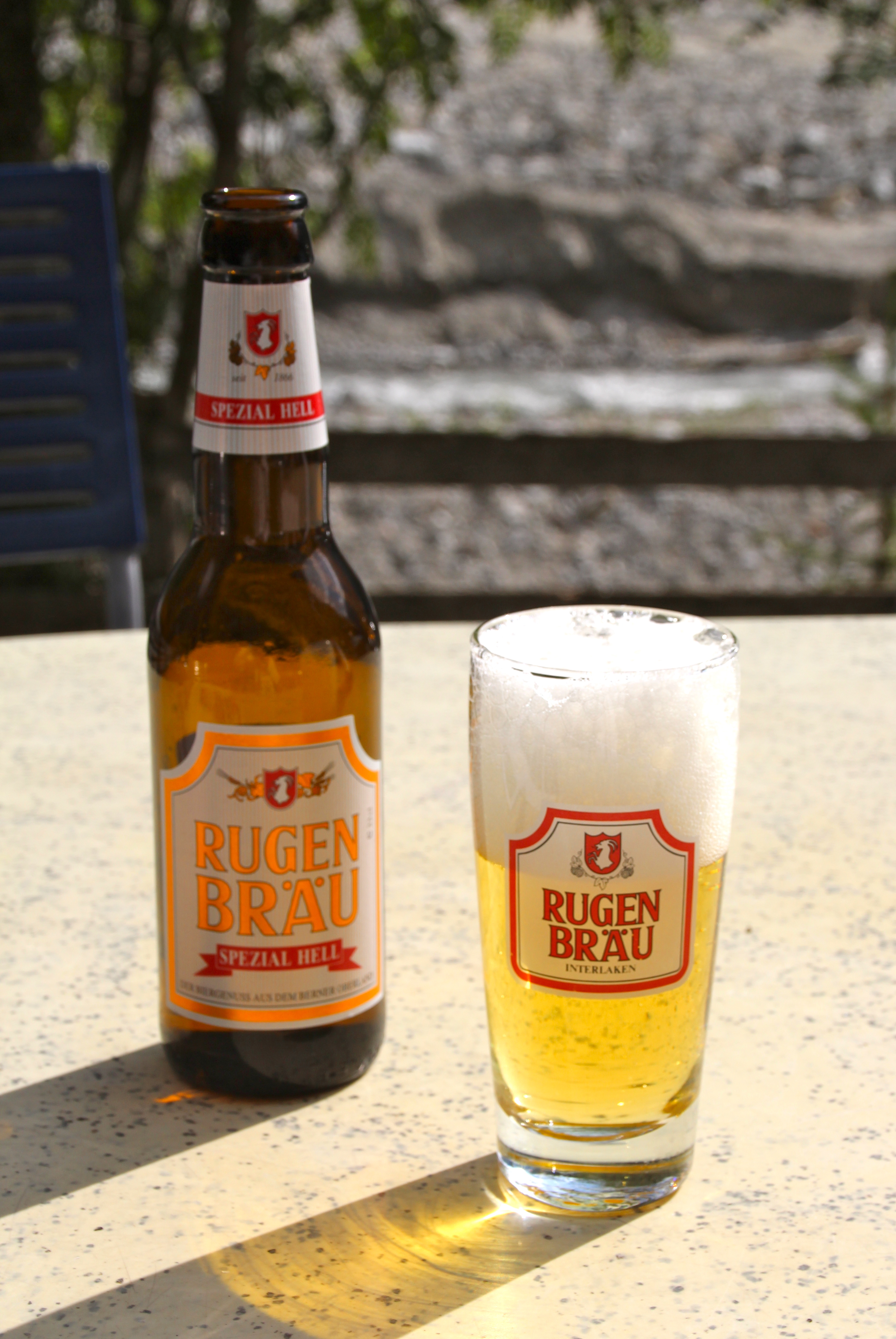 Rugenbräu